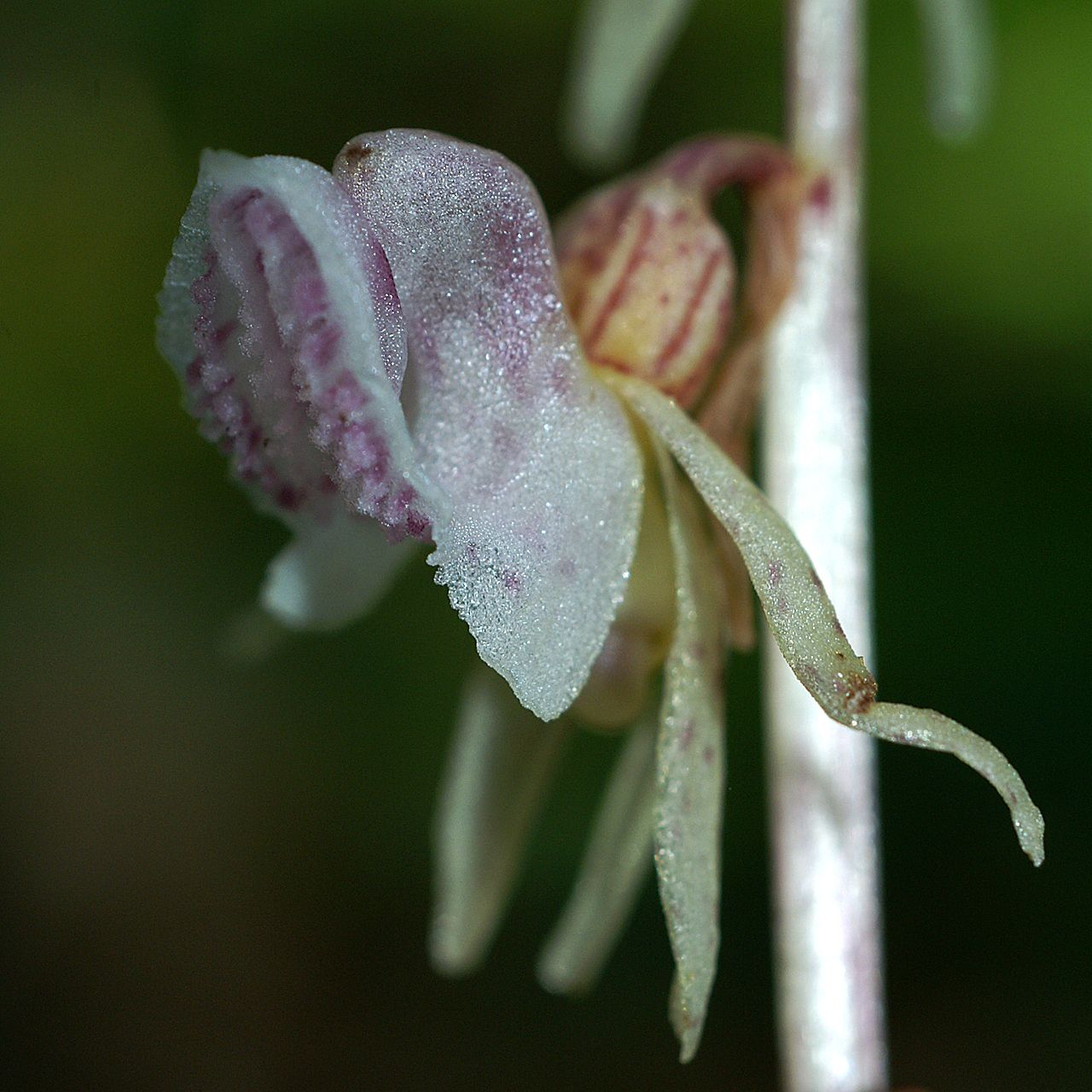 Epipogium aphyllum